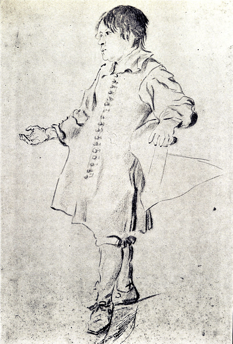 High school student begging. Djäkne.